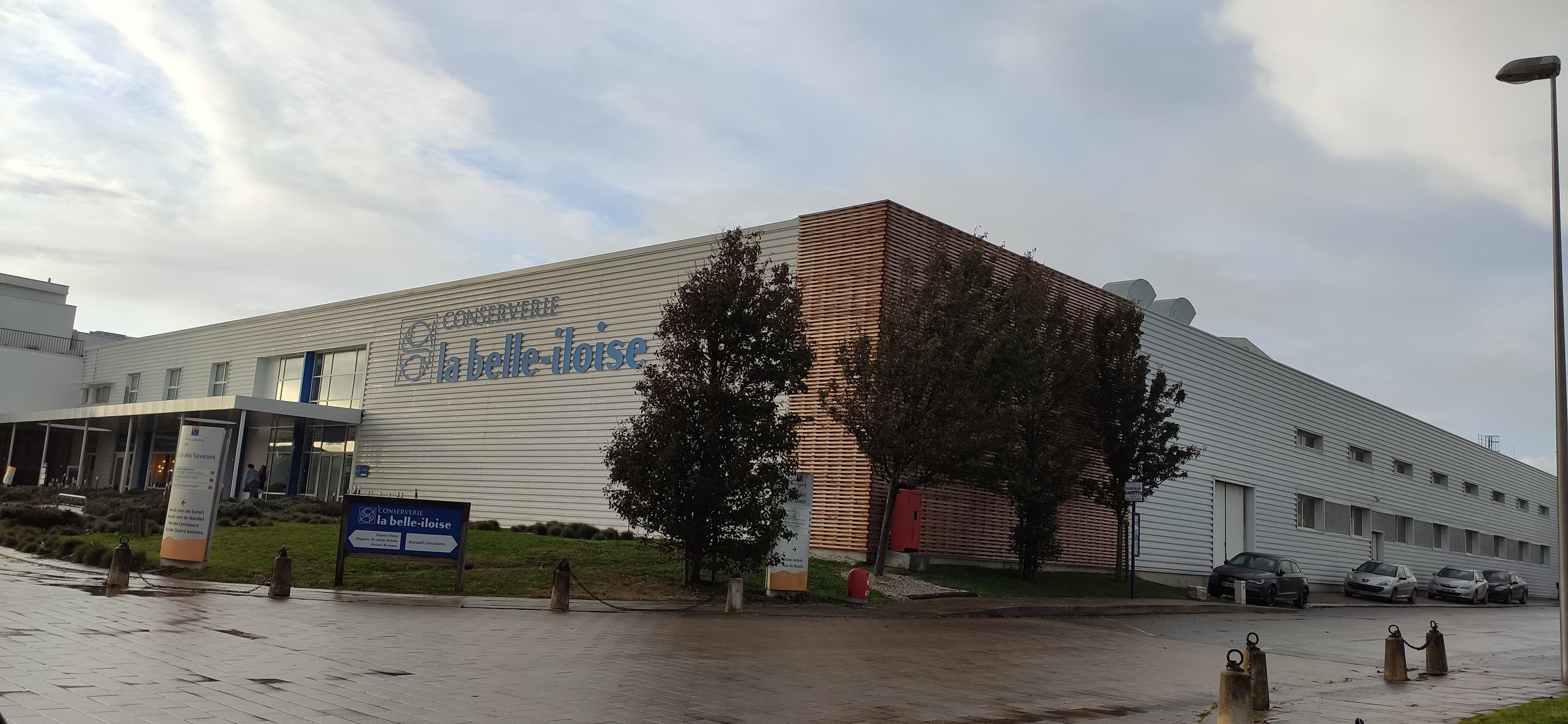 Usine la Belle-Iloise dans la zone artisanale